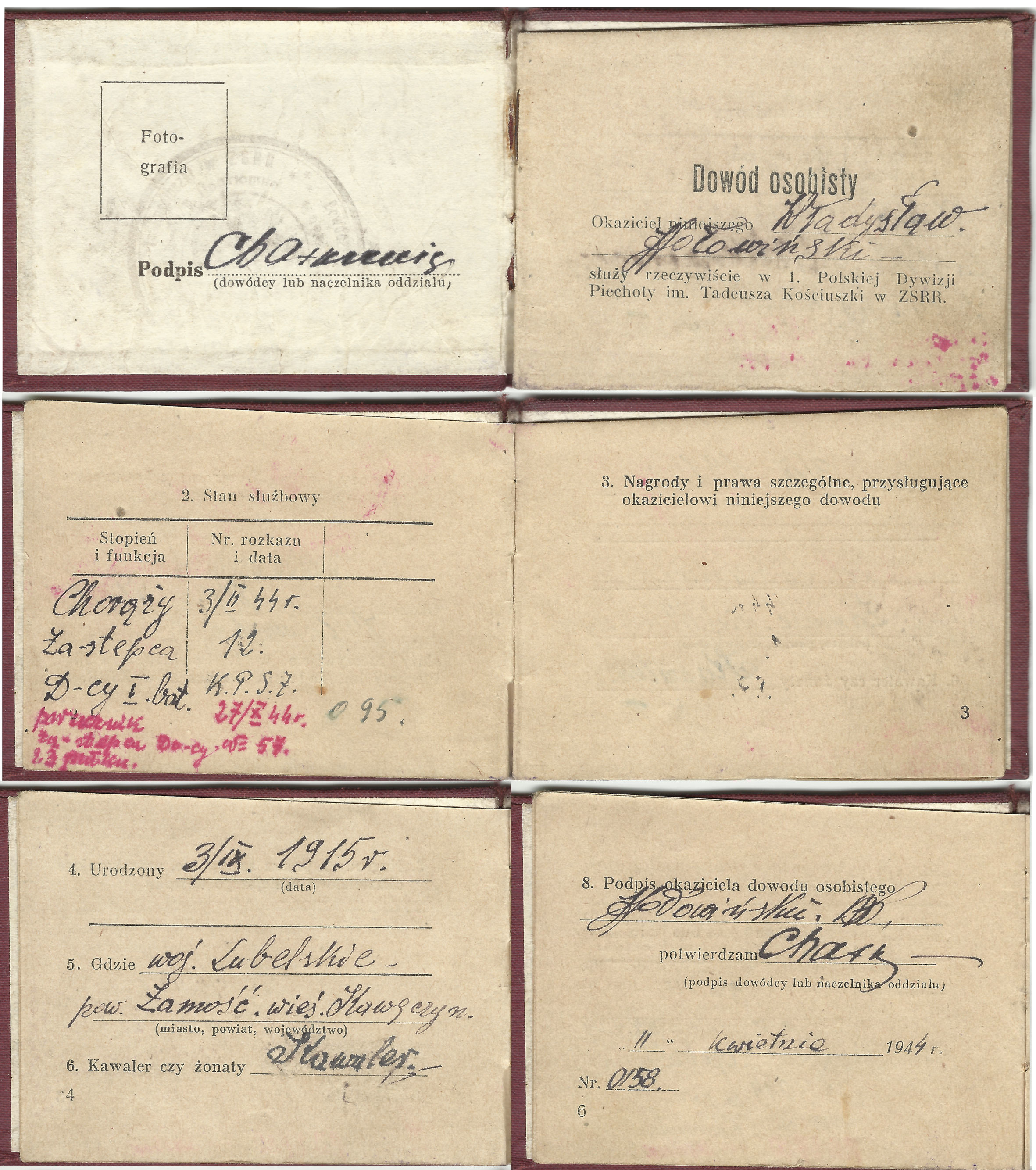 Wybrane strony z dowodu osobistego żołnierza 1 Dywizja Piechoty im. Tadeusza Kościuszki - Władysława Hołowińskiego. Strona 2 zawiera wpis dotyczące stanu służbowego: 1) Chorąży Zastępca Dowódcy I Batalionu 2) Porucznik Zastępca Dowódcy 23 Pułku (chodzi o 23 Pułk Artylerii Lekkiej) - wpis z 27 października 1944 r. Strona 4 wskazuje miejsce urodzenia żołnierza.